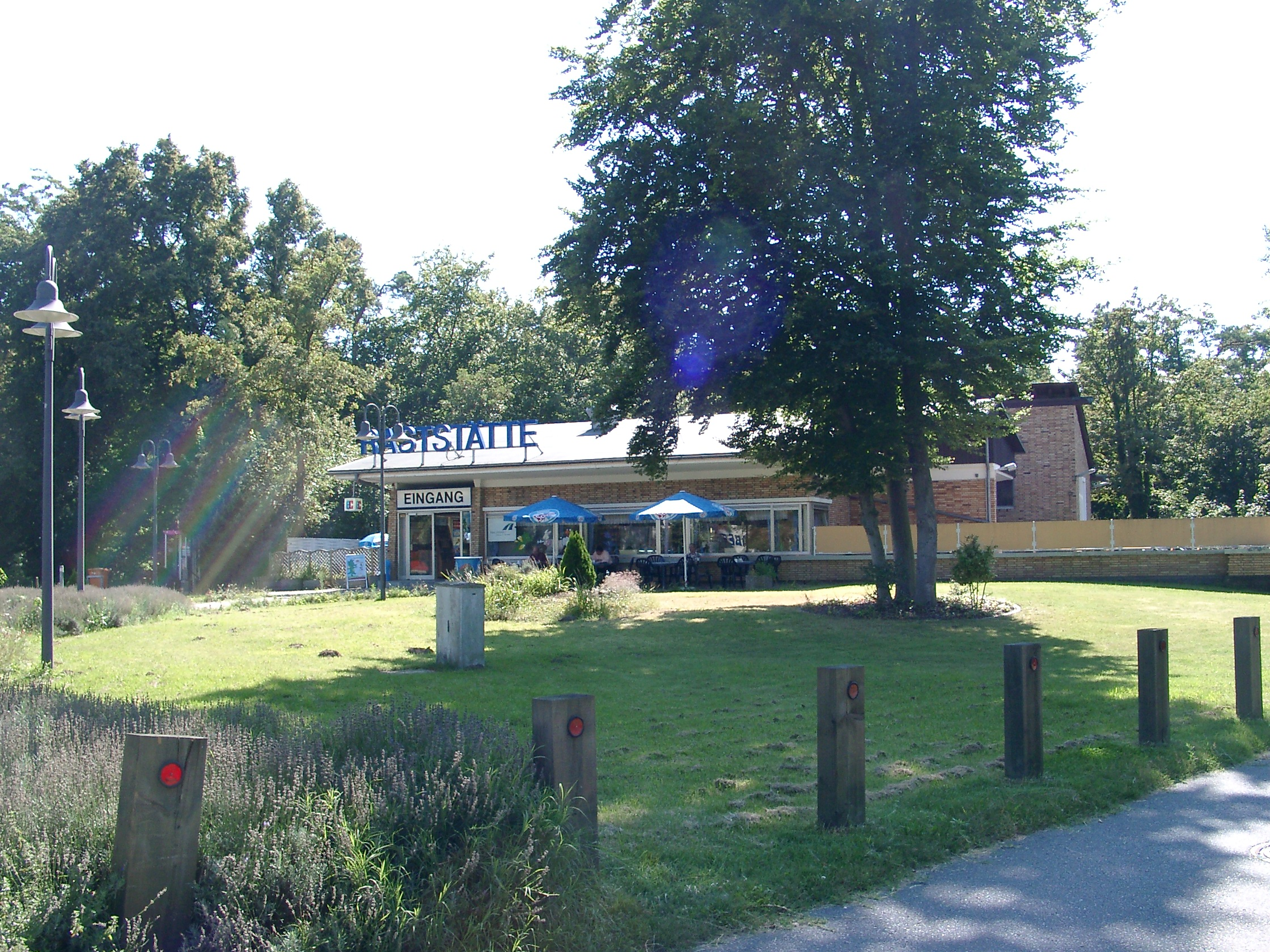 Bundesautobahn-Raststätte Pfungstadt-West nahe Darmstadt